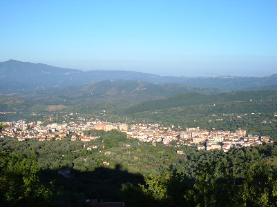 Panoramica di Vallo della Lucania